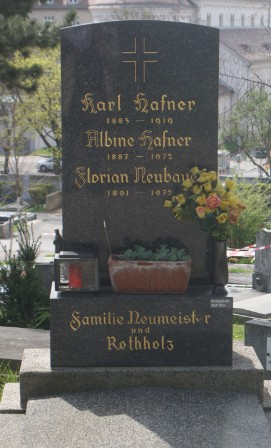 Grab Brigitte Neumeister-Hernalser Friedhof